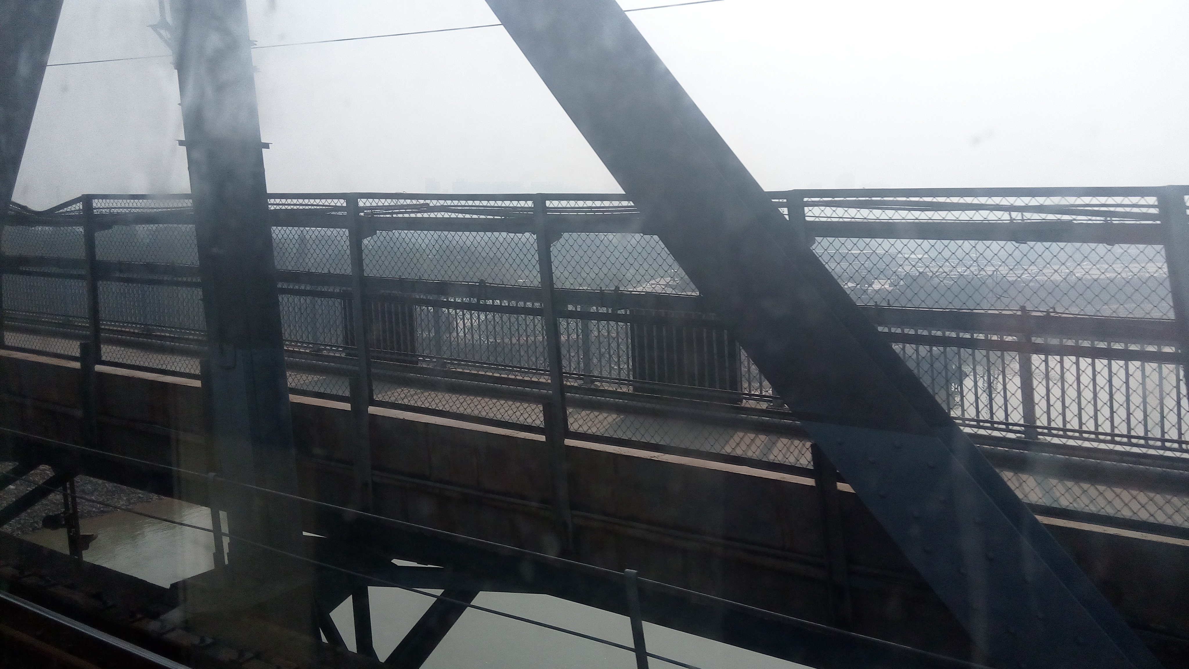 赣江大桥，列车在南昌方向线路驶向南昌，其他自己推测。